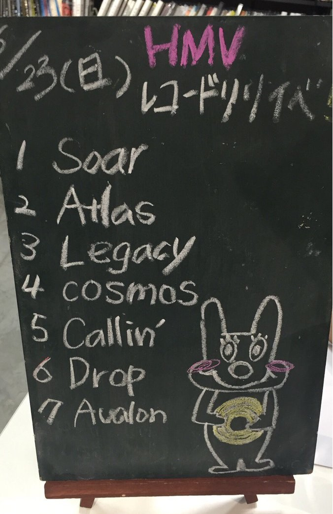 amiinAセトリボード(20170723(1))